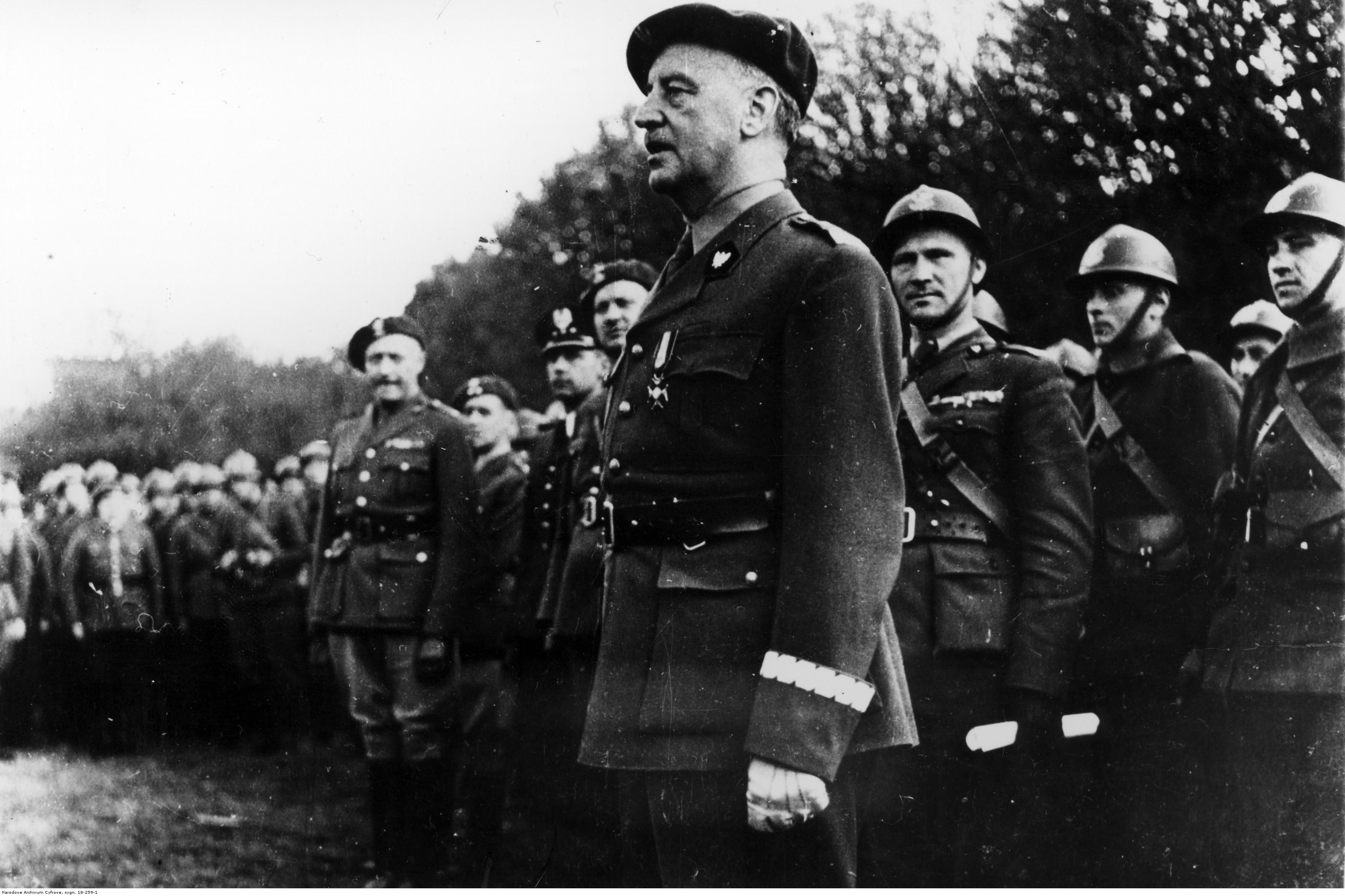 Gen. Władysław Sikorski żegna Samodzielną Brygadę Strzelców Podhalańskich przed jej wyjazdem do Norwegii. Archiwum Fotograficzne Czesława Datki. Sygnatura: 18-259-1